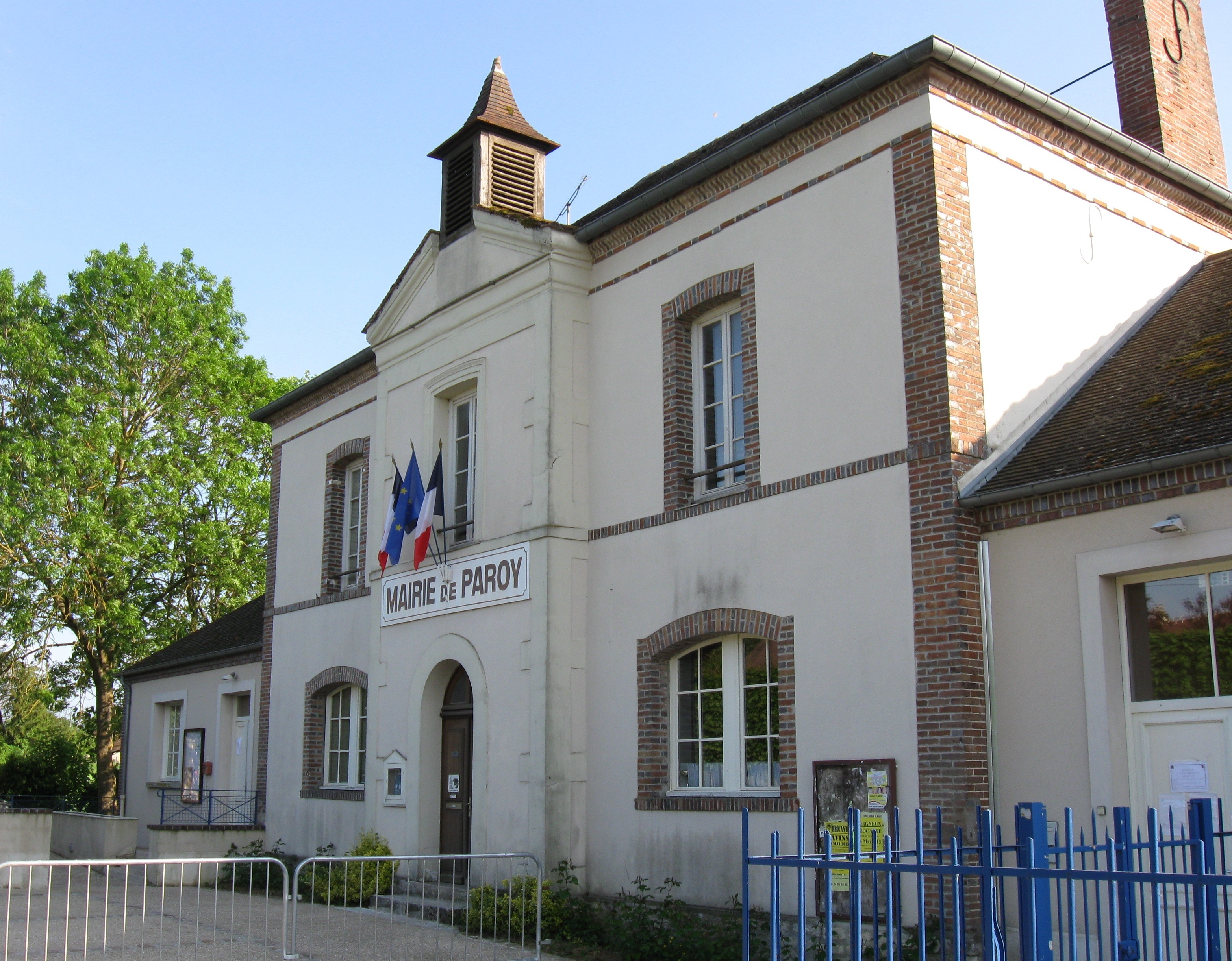 Mairie de Paroy. (Seine-et-Marne, région Île-de-France).